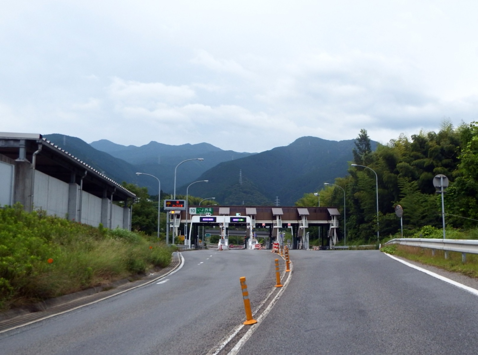 いよ西条インターチェンジの入口